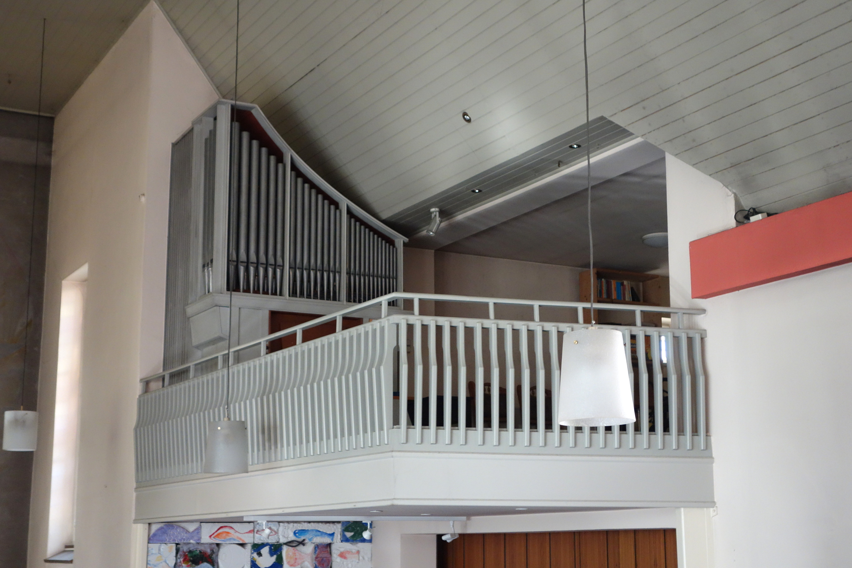 Orgel in Handeloh, Landkreis Harburg, Niedersachsen, Deutschland